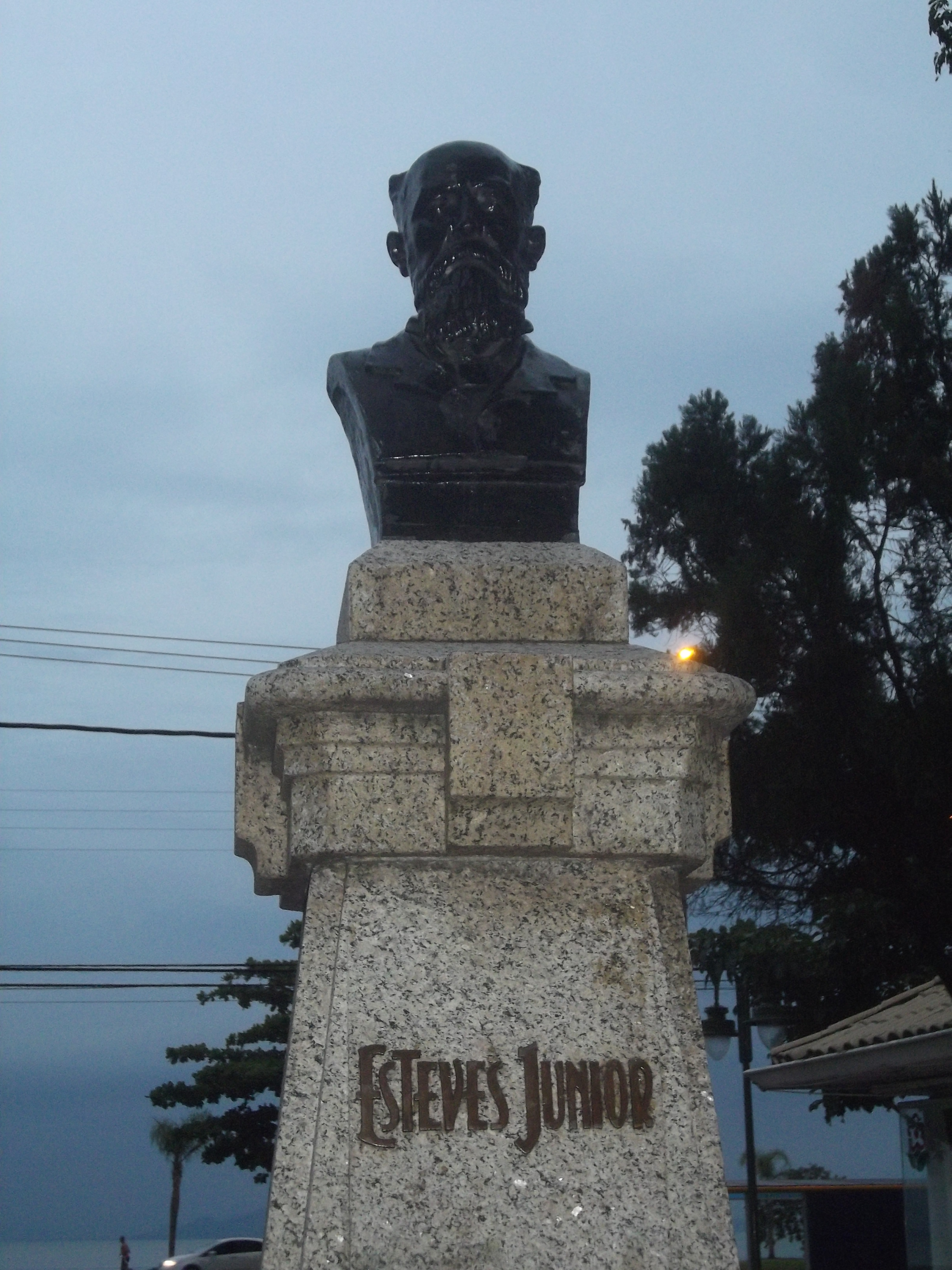 Praça Esteves Junior, Florianópolis, Brasil